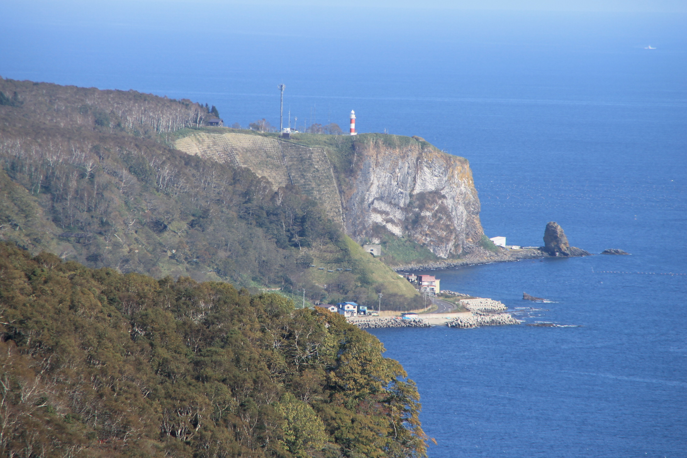 北海道羅臼町の羅臼国後展望塔から羅臼灯台 (Rausu Lighthouse) を望む。